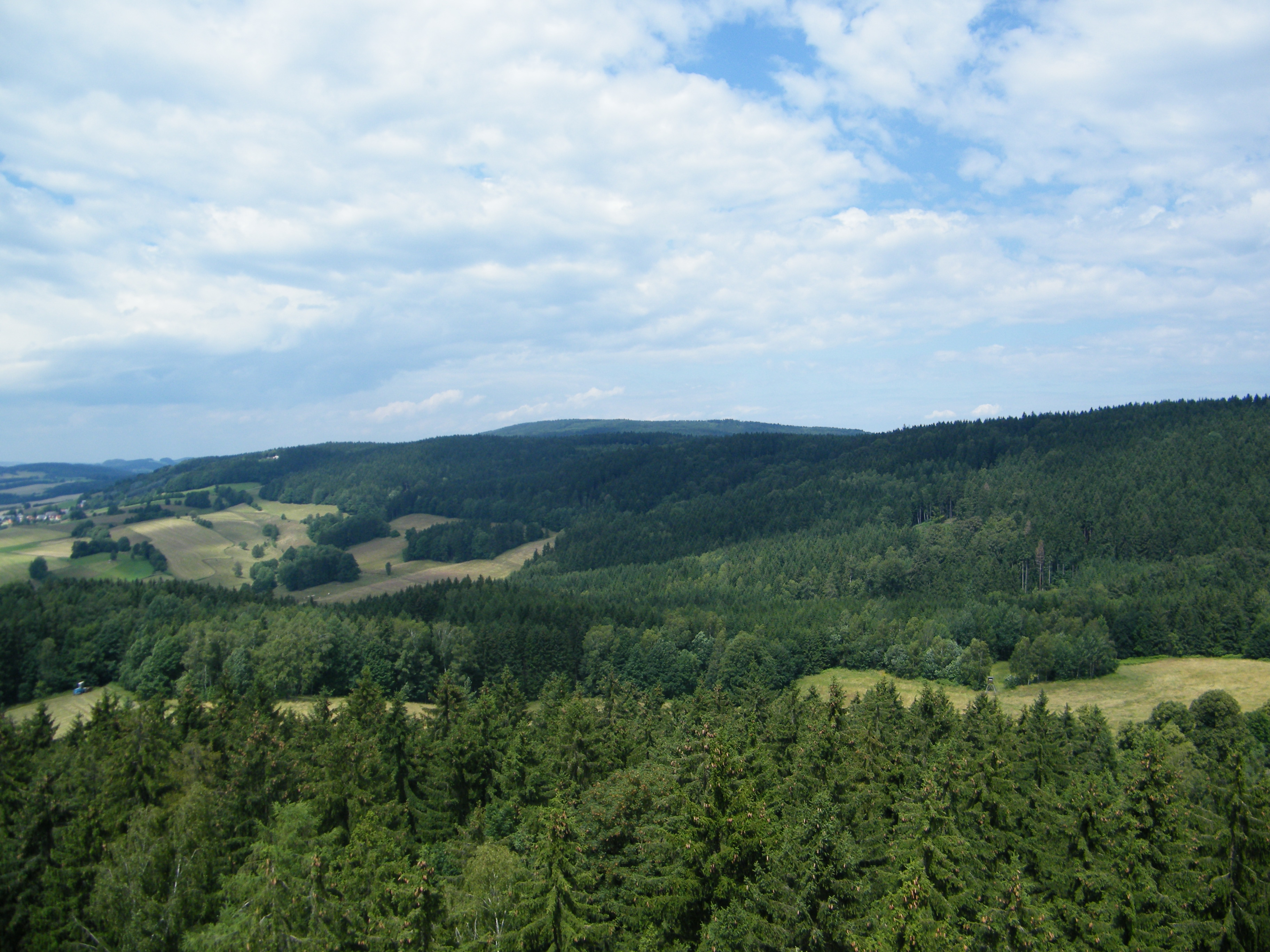 Uprostřed v pozadí Tanečnice, vlevo Wachberg, vpravo Hančův (Hraniční) vrch, pohled z Weifbergu